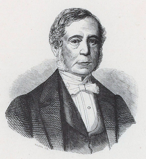 Saverio Baldacchini